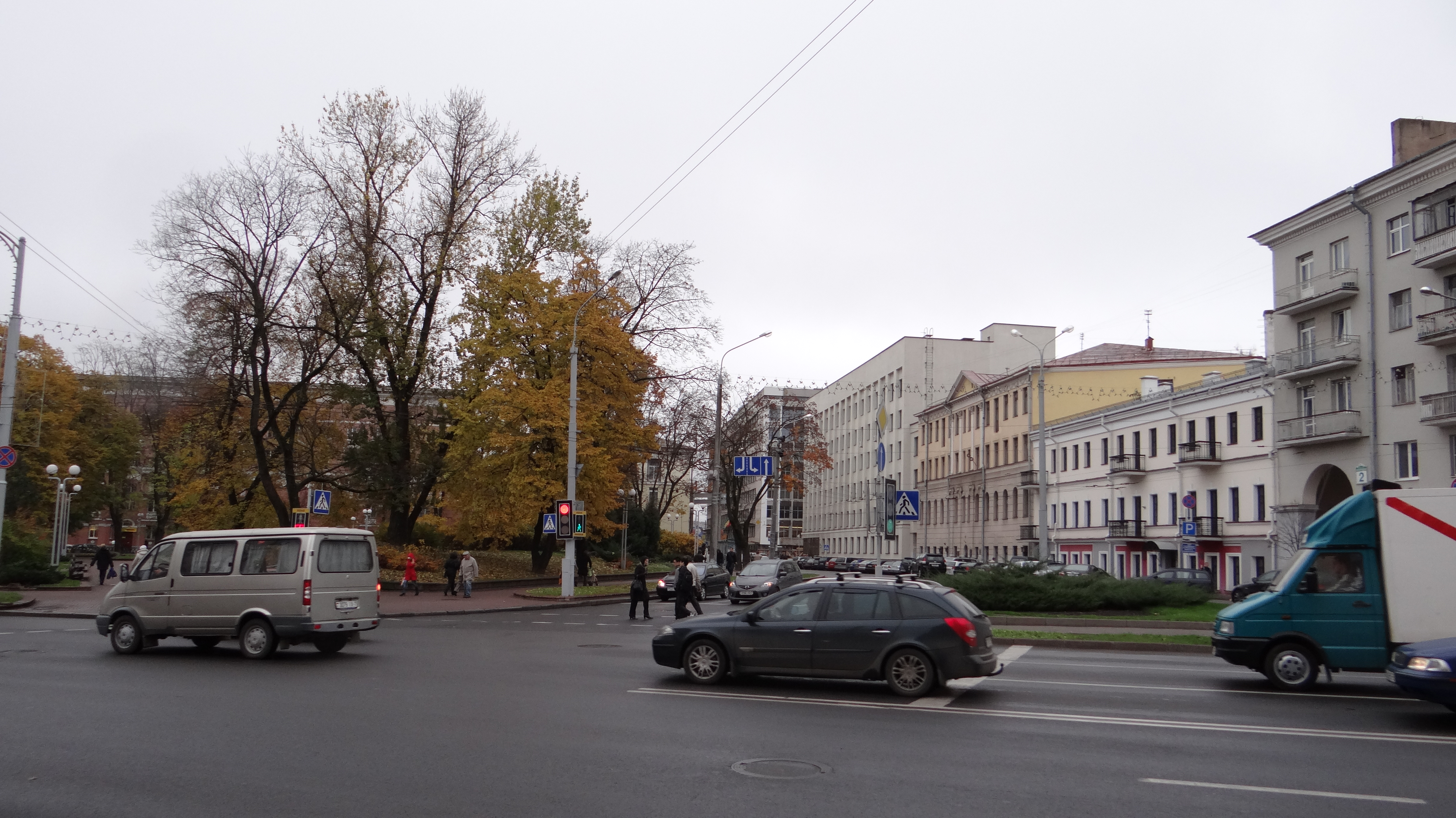 Minsk, Belarus